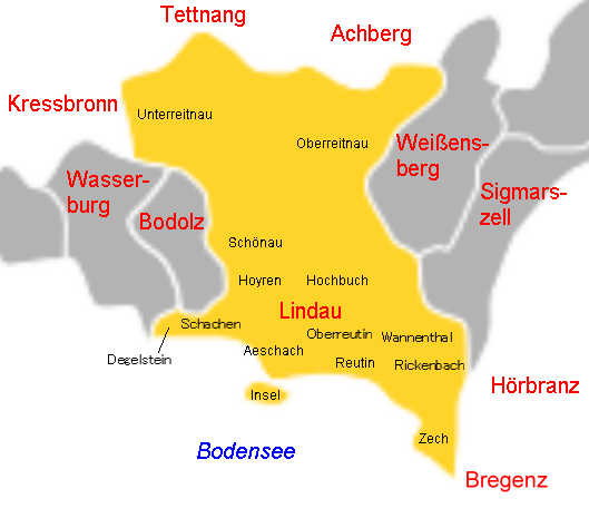 Lindau: Stadtteile und Nachbargemeinden